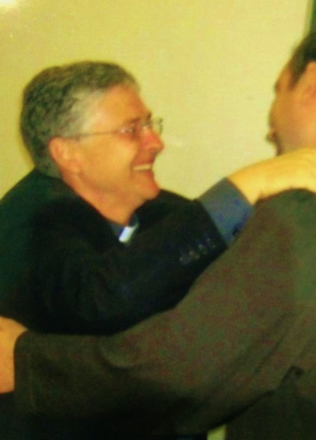 Piazza